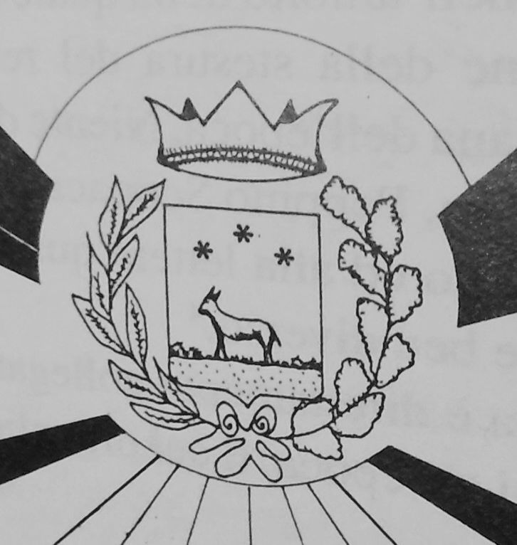 Rielaborazione di F. Tassone dell'antico Stemma del Comune di Fabrizia da F. Carè “La Cavalera – 400 anni di storia di Fabrizia”